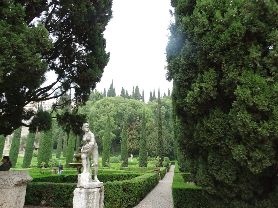 Vista del giardino